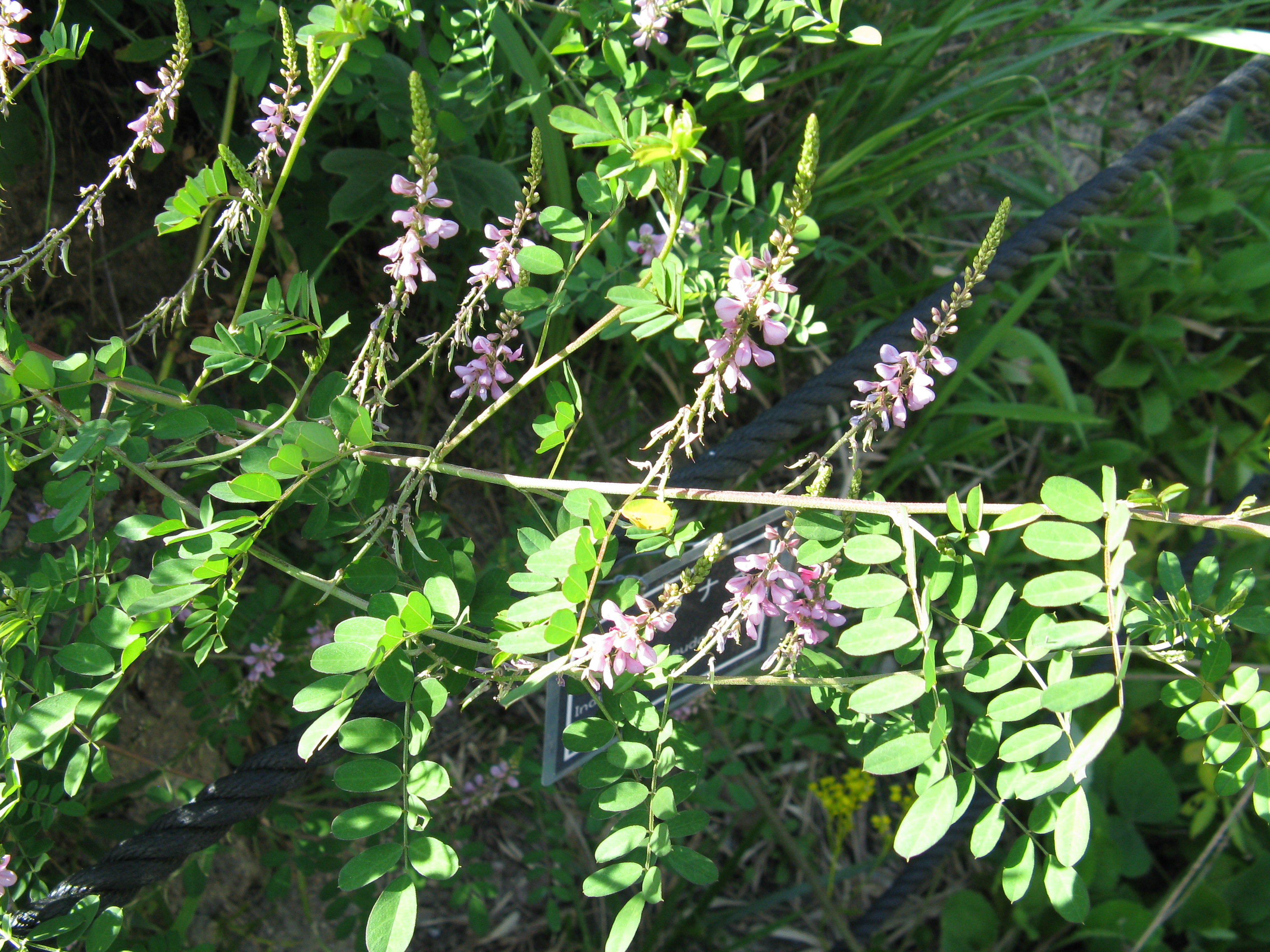 Scientific name Indigofera pseudotinctoria